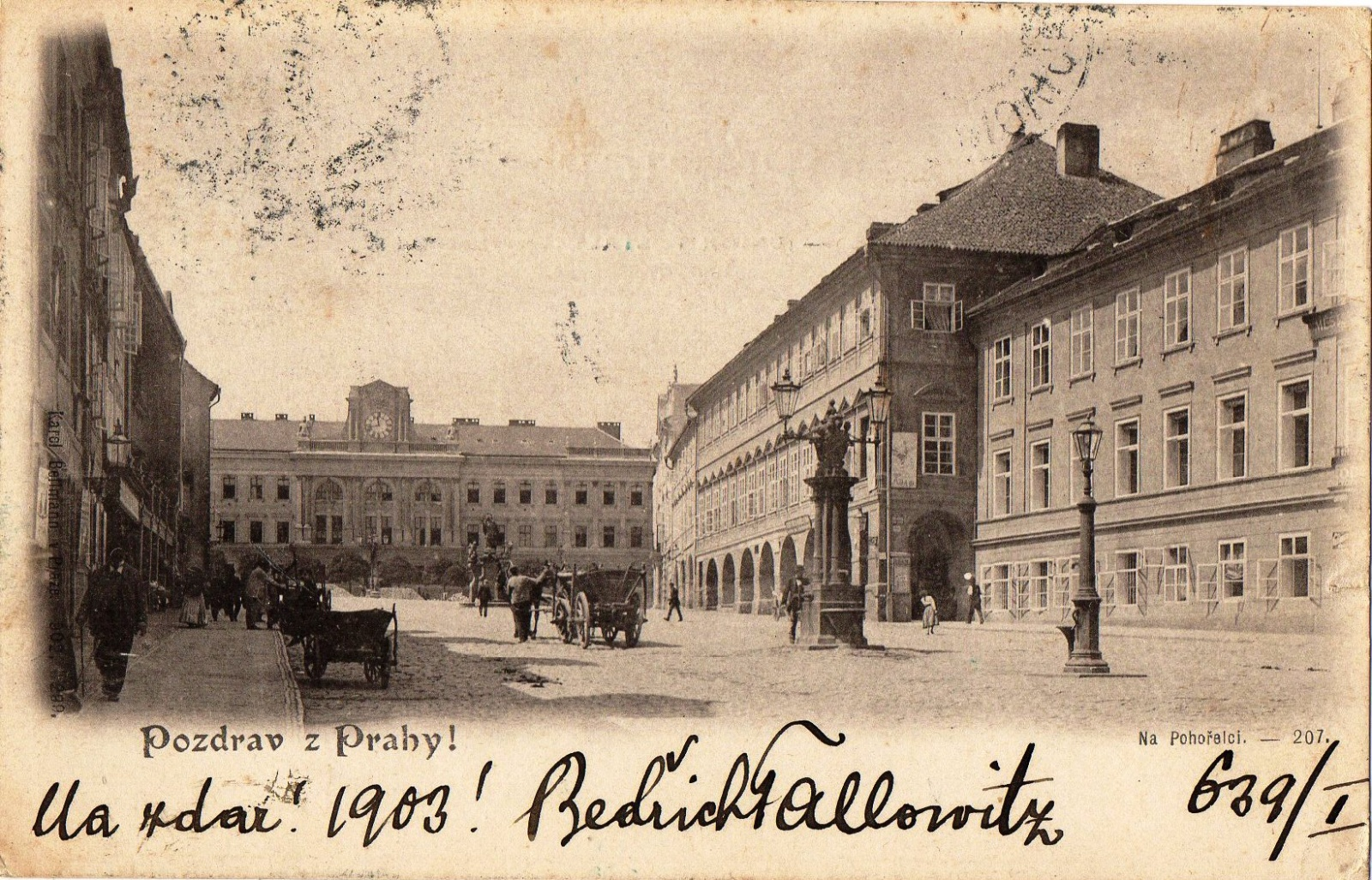 Kasárna